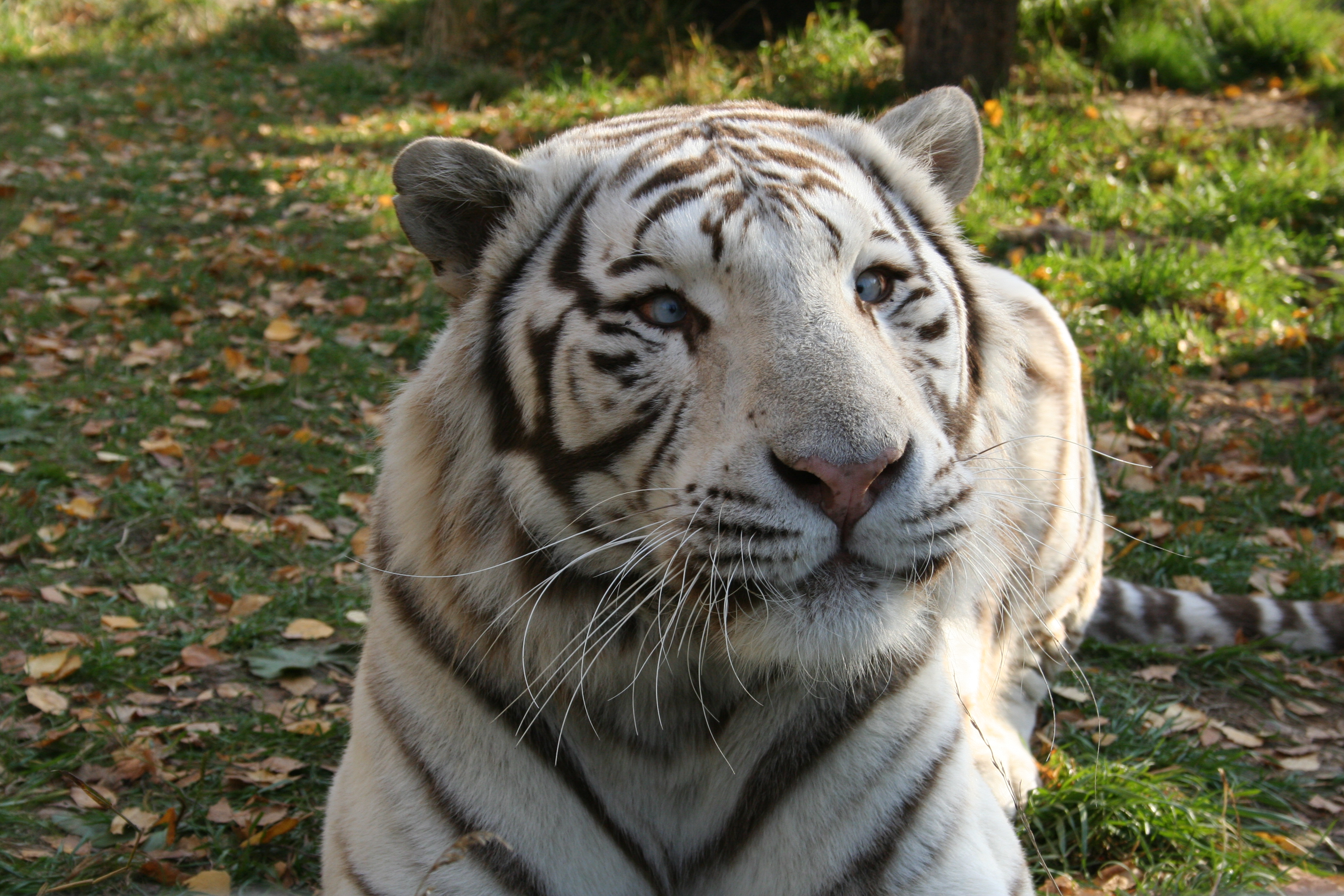 Тигр